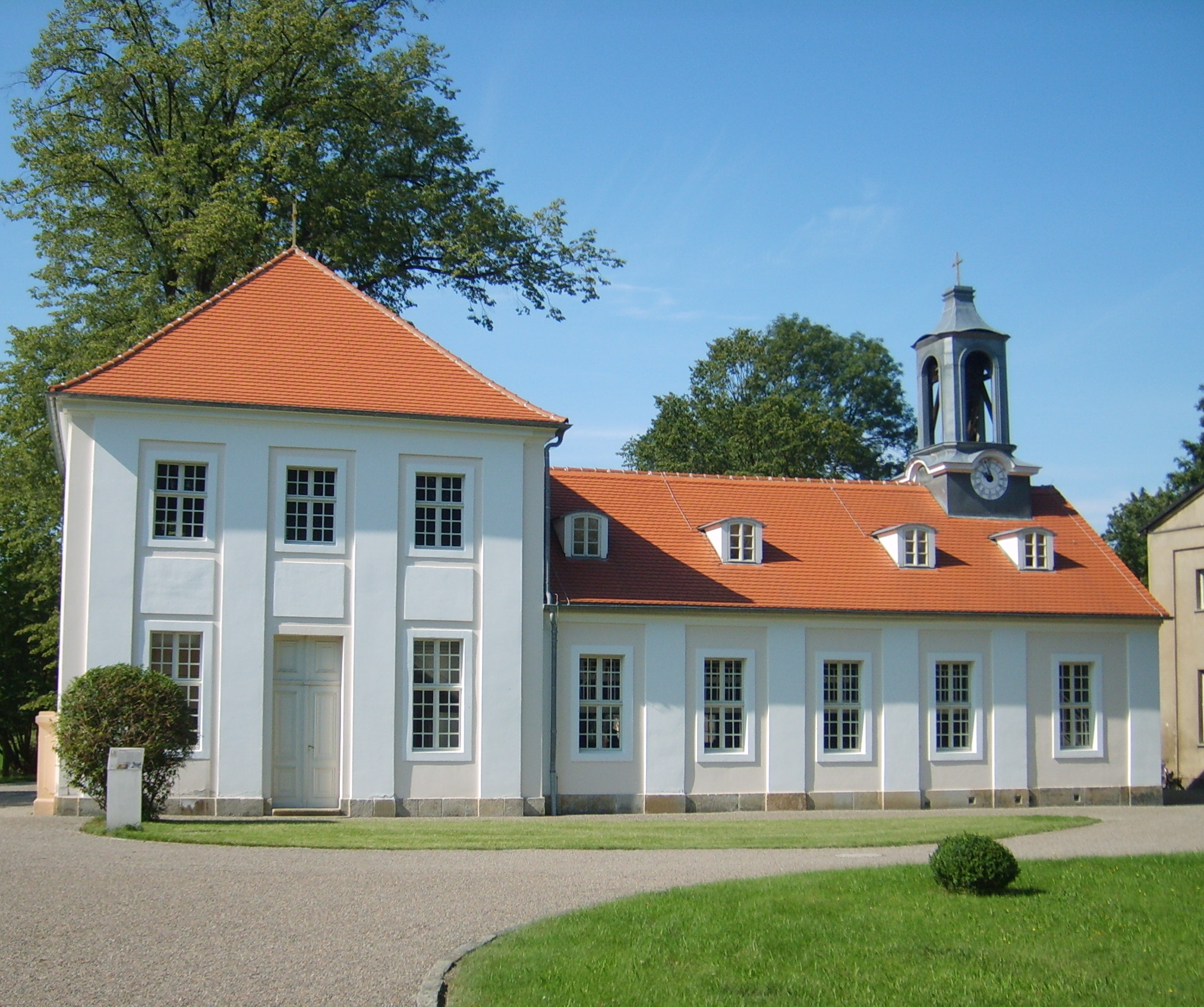 Schlosskirche im Schlosspark Lauchhammer-West